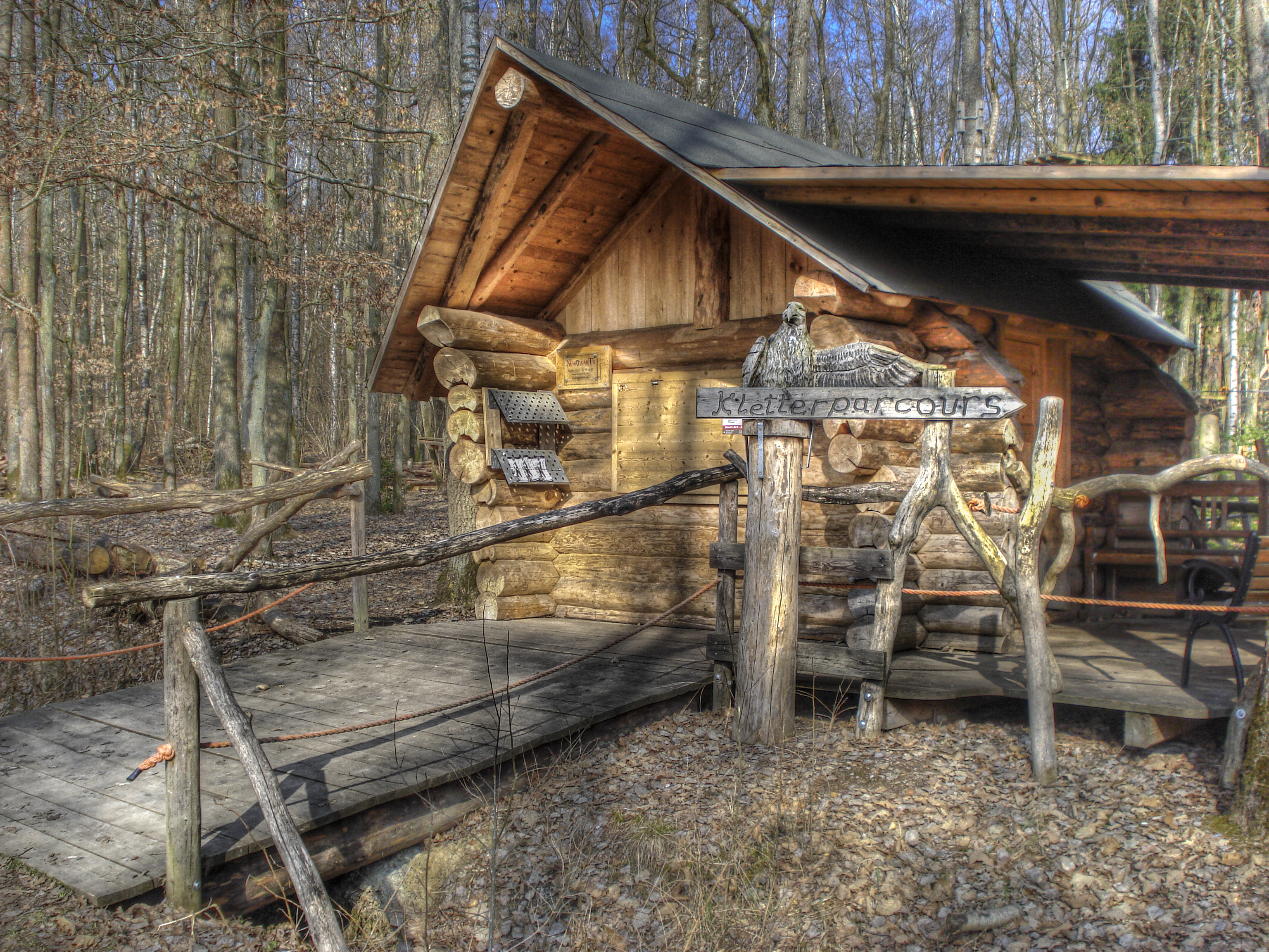 Kletterparcours am Ellertshäuser See bei Stadtlauringen